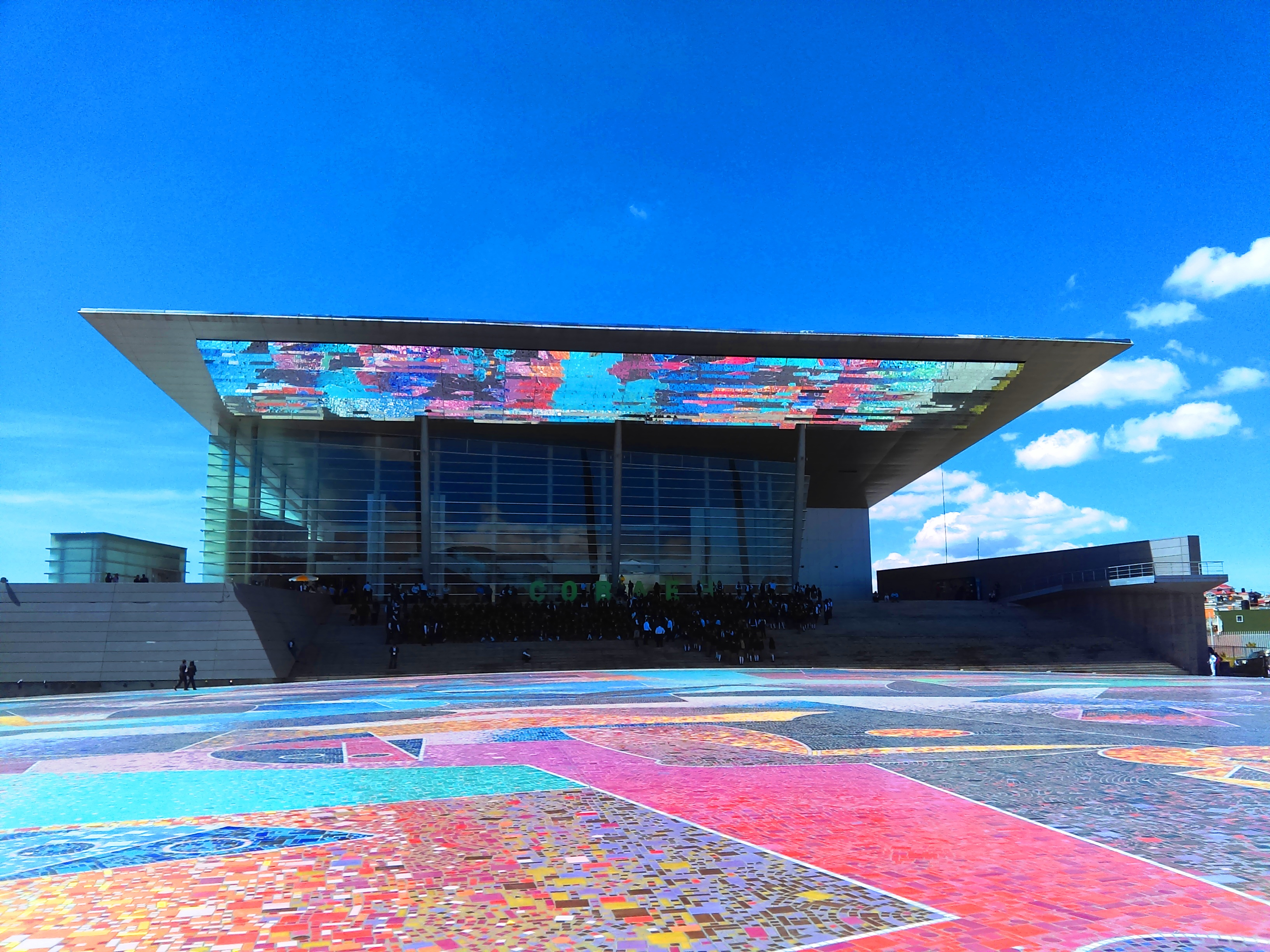 Auditorio Gota de Plata.